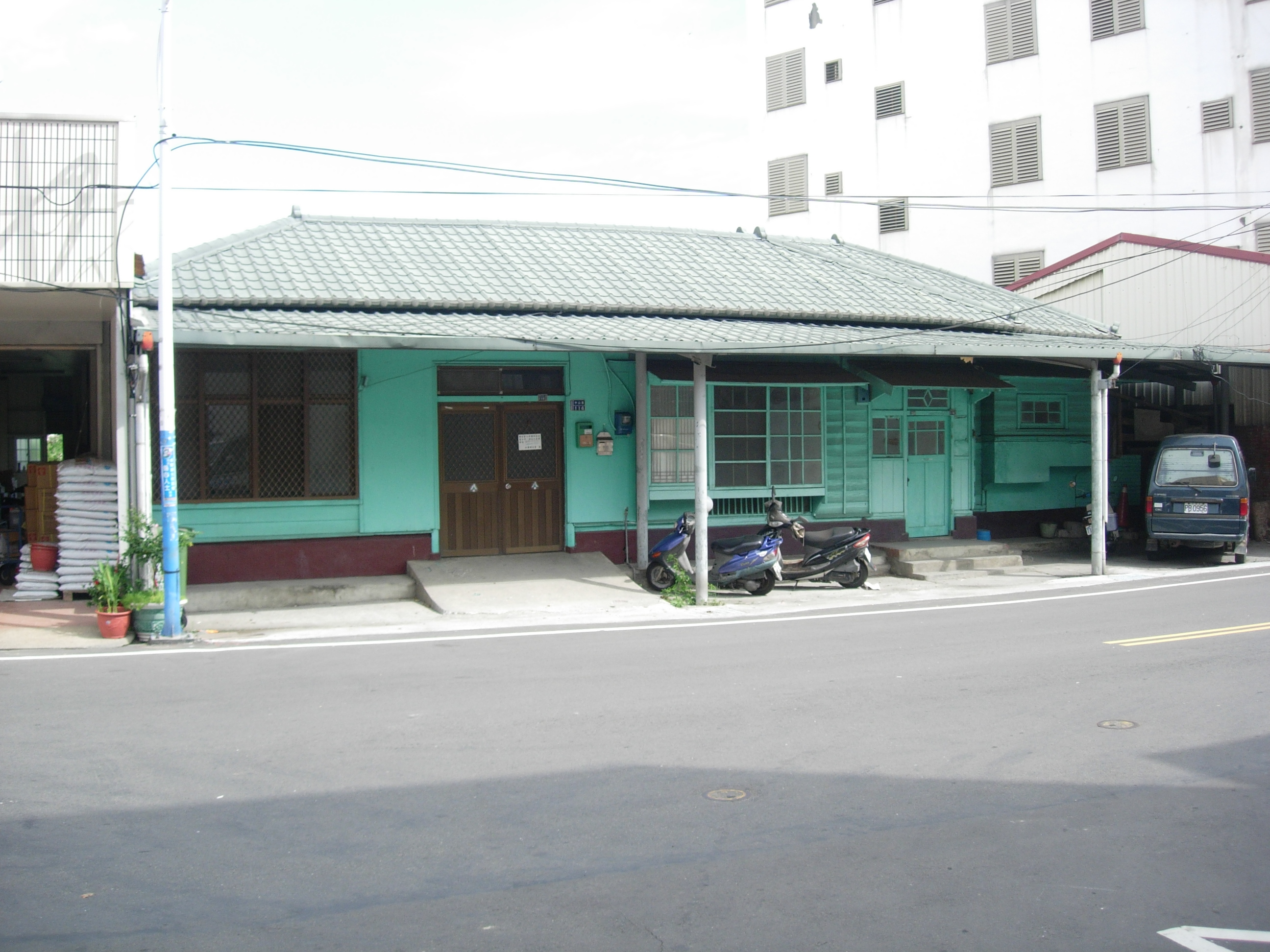 中文（台灣）: 卓蘭鎮公所旁老式建築